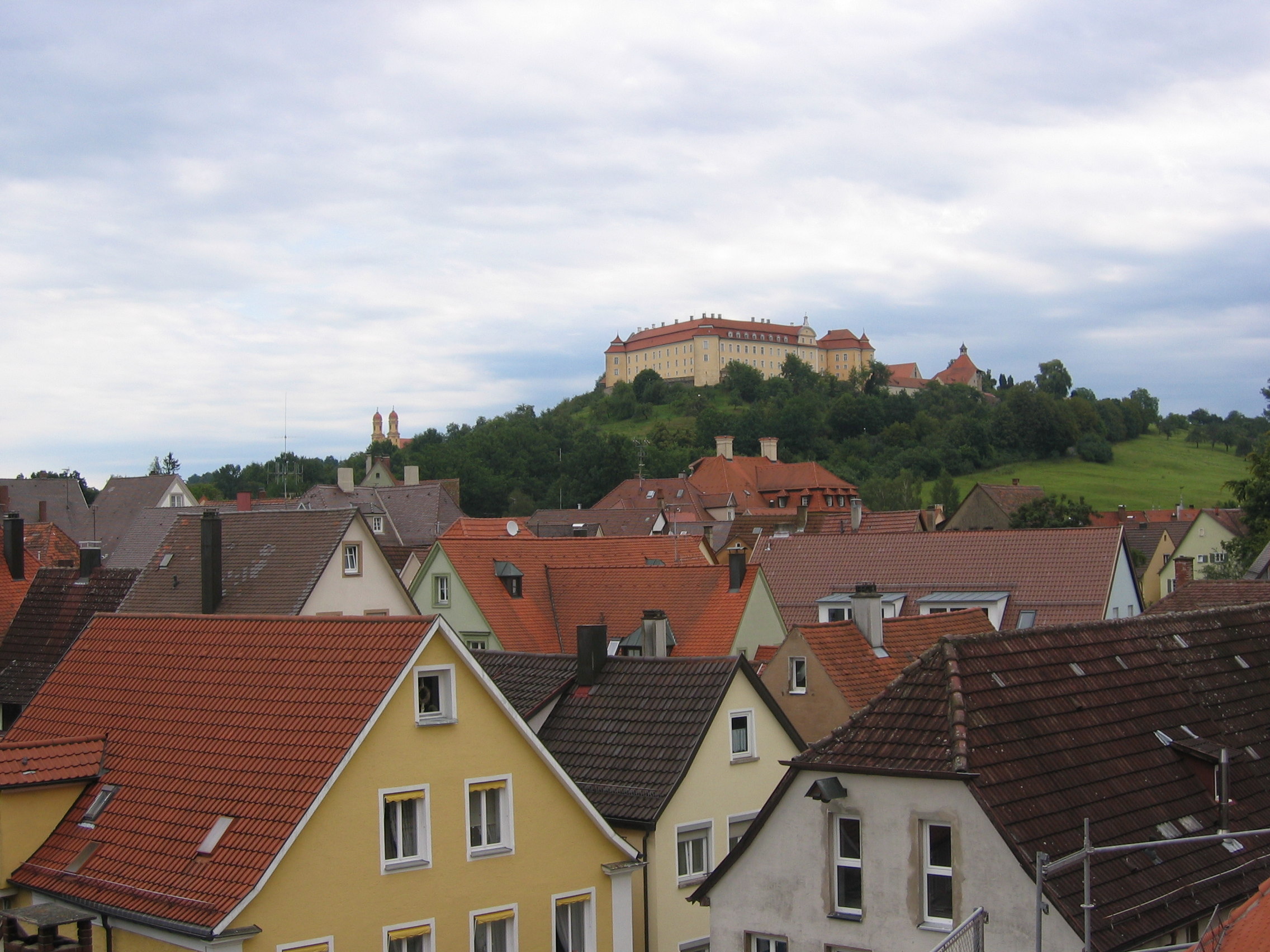 Blick über die Altstadt von Ellwangen auf das Schloss Ellwangen